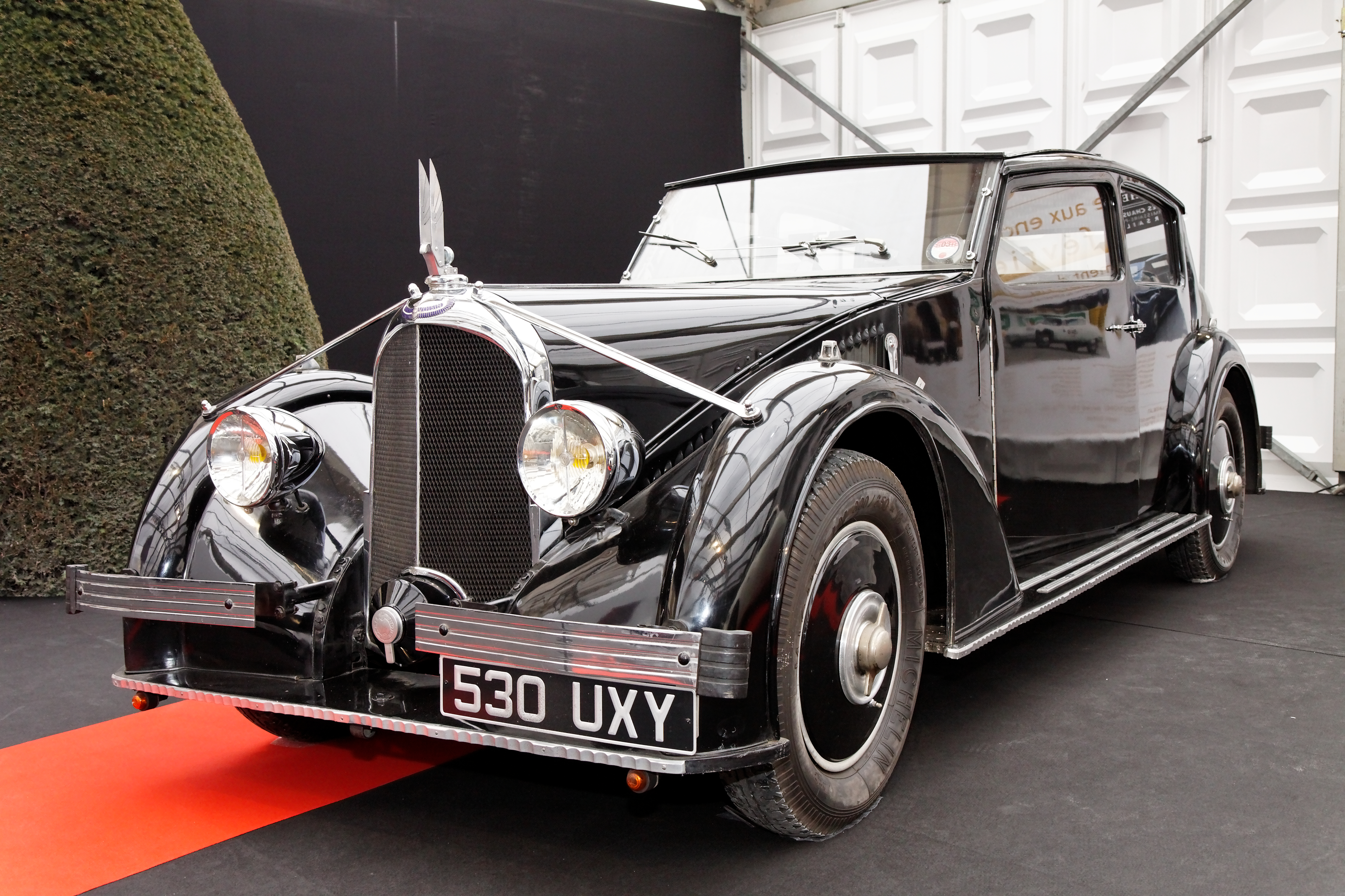 L'Avions Voisin C25 Cimier exposée devant le dôme des Invalides lors du festival automobile international 2011.